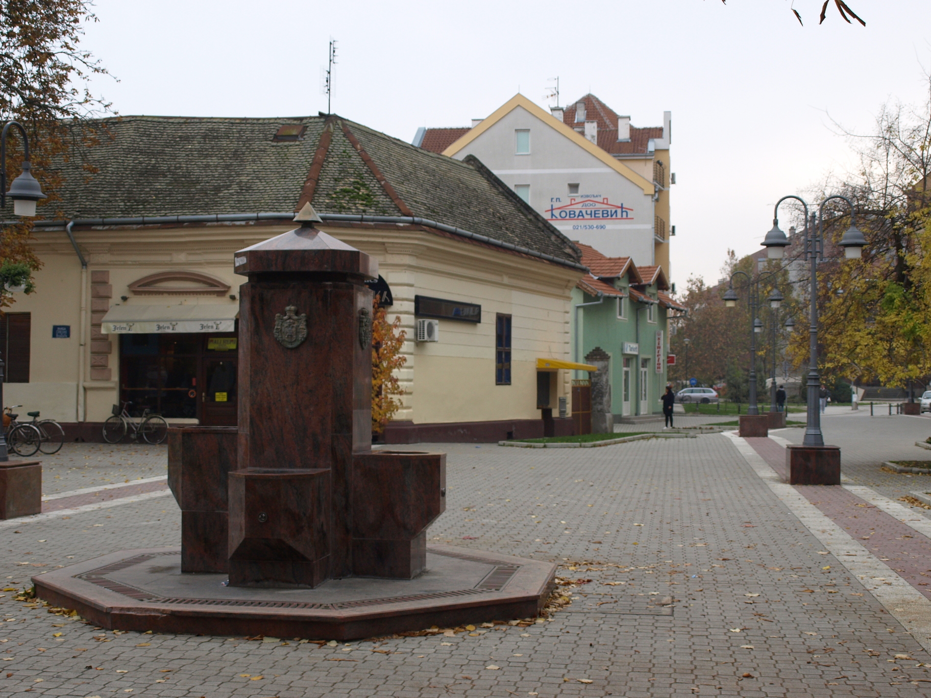 apatin cesma